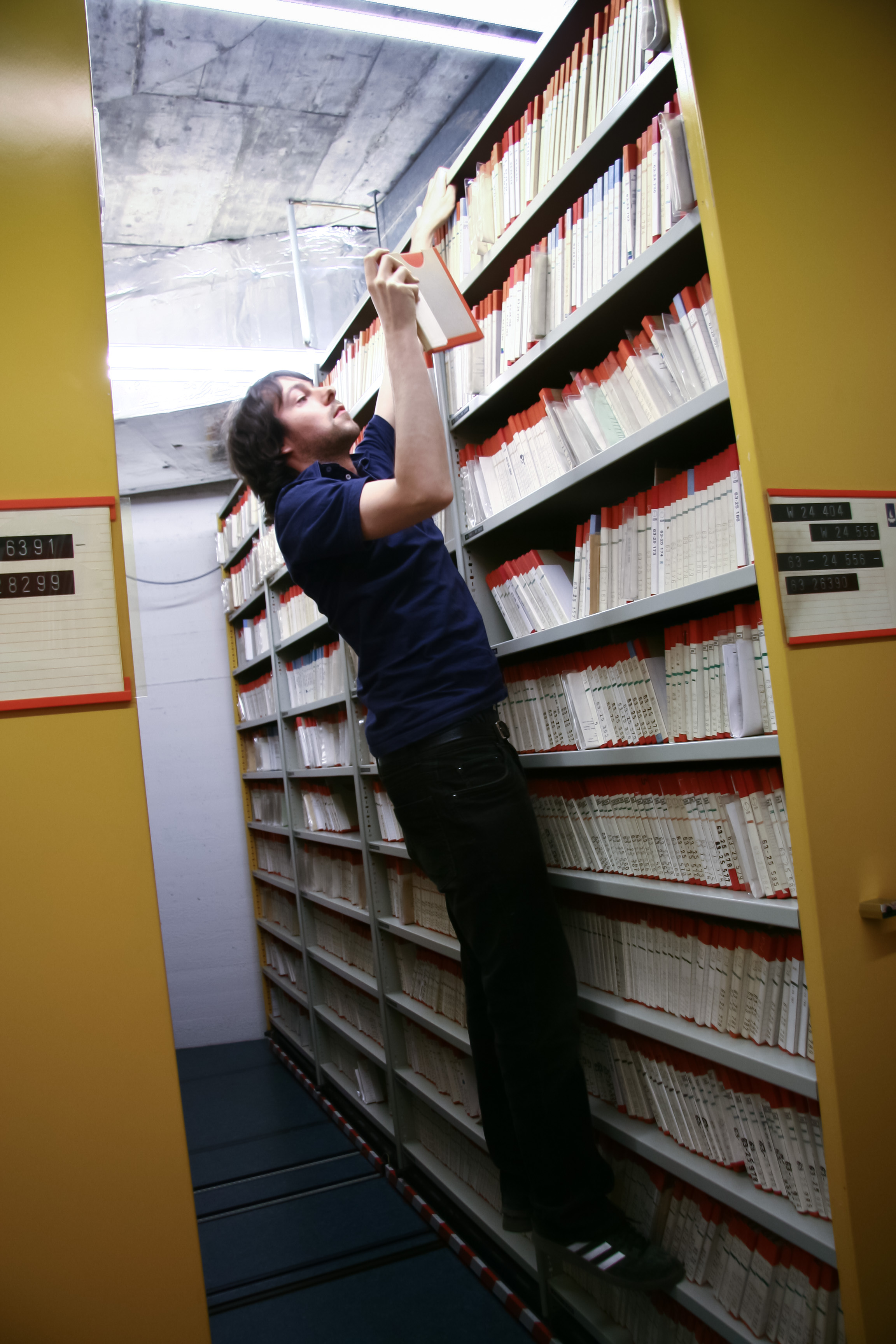 Ein Mitarbeiter der Abteilung Dokumentation und Archive des Südwestrundfunks (SWR) in Stuttgart holt einen Bandkarton mit historischen Aufnahmen aus dem Regal.